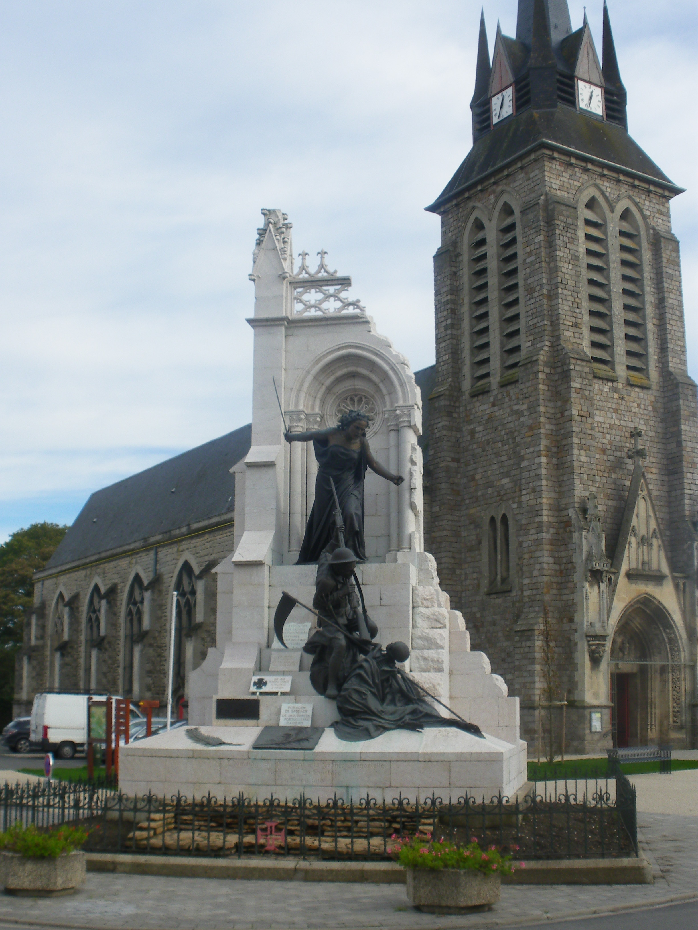 Monument en hommage aux combattants portugais de la Première guerre mondiale, situé à La Couture.